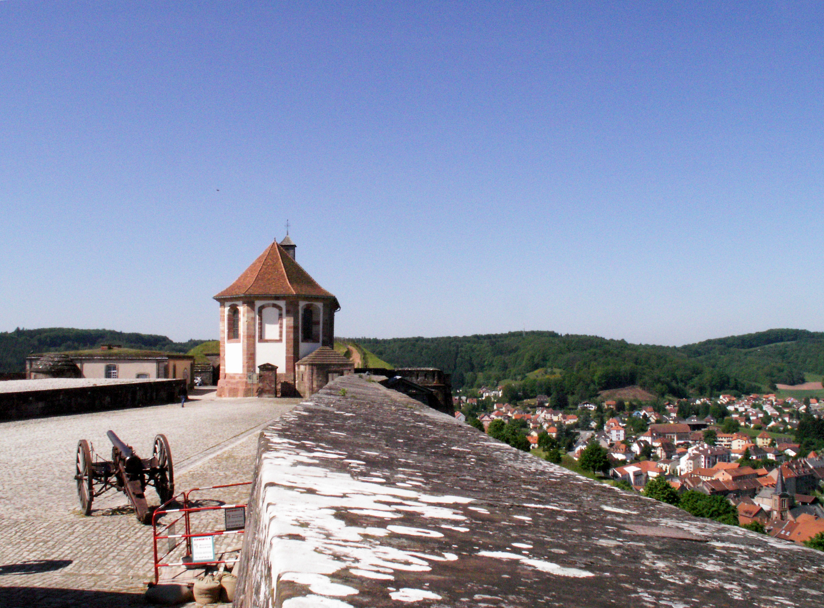 Citadelle de Bitche (Moselle, France)